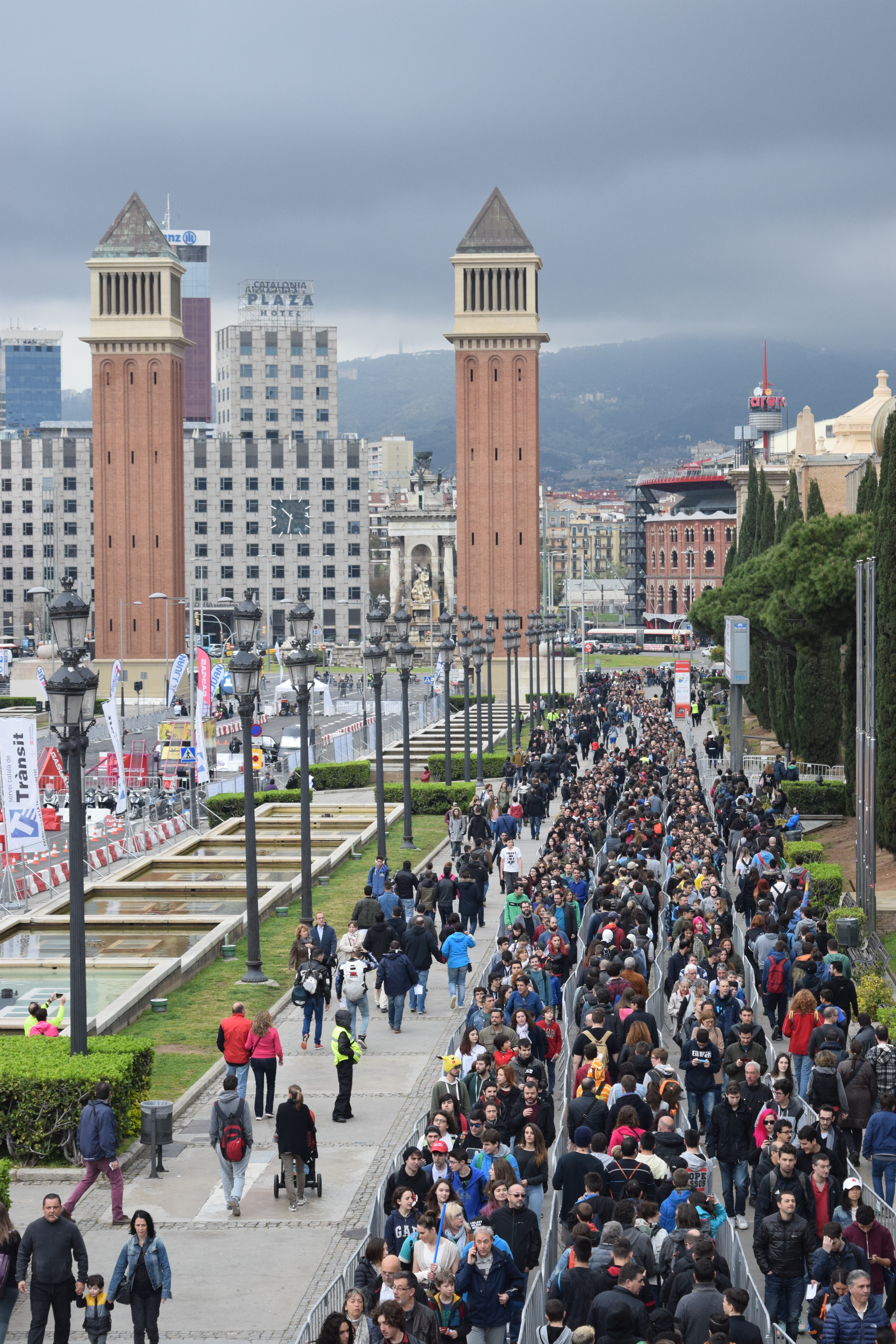 Llargues cues de gent a l'Avinguda Maria Cristina esperant per entrar al 35è Saló. Saló Internacional del Còmic de Barcelona de 2017. Dissabte 01 d'abril de 2017.